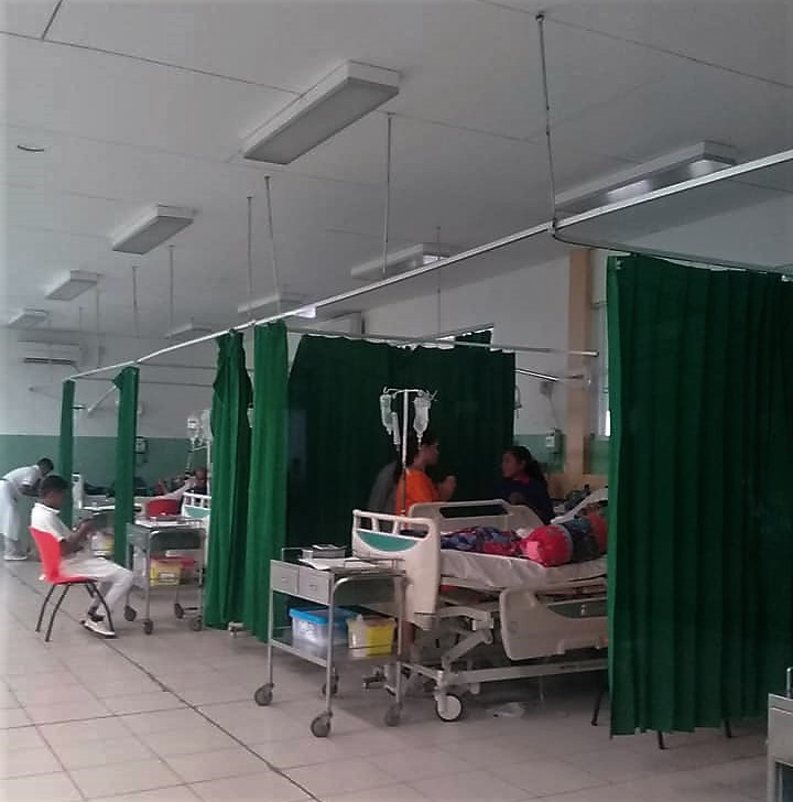 Opfer der Tragödie von Culuhun im Hospital Nacional Guido Valadares